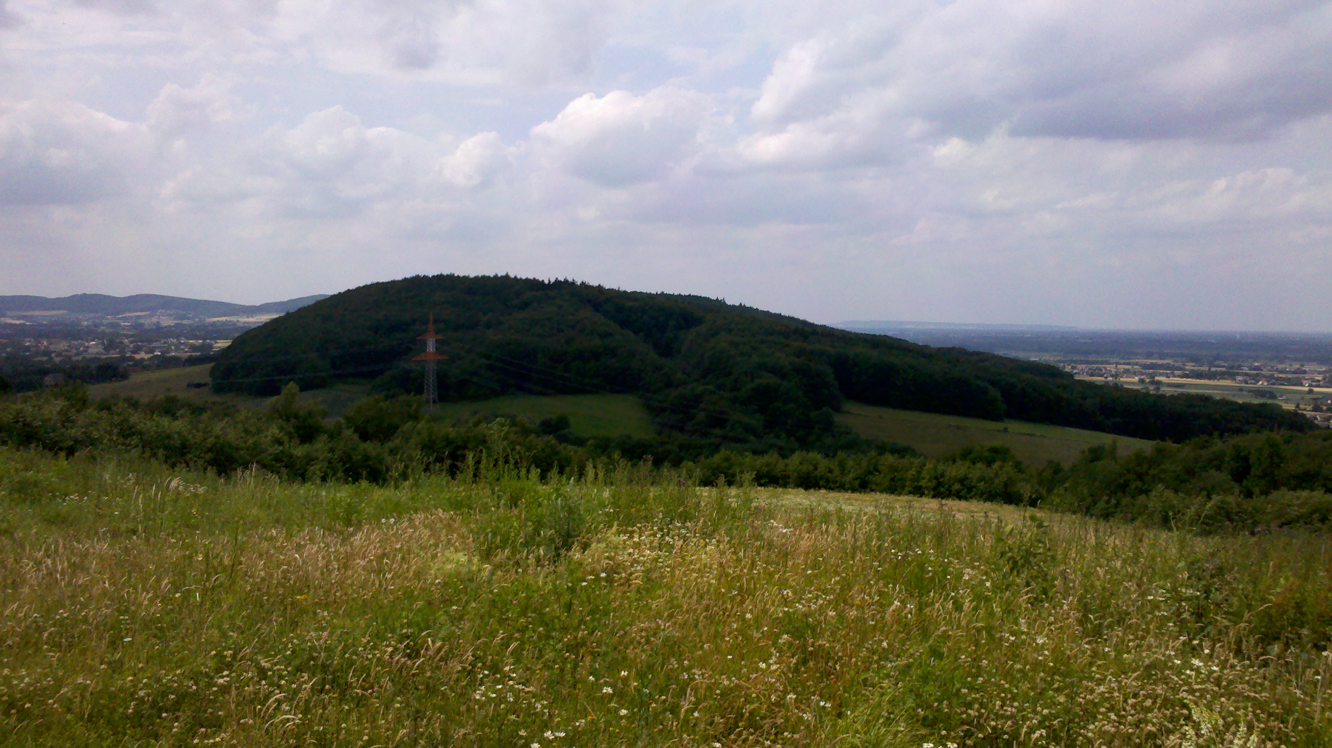 Elfter Kopf im Wiehengebirge an der Wallücke in Hille-Oberlübbe. Blickrichtung nach Westen.